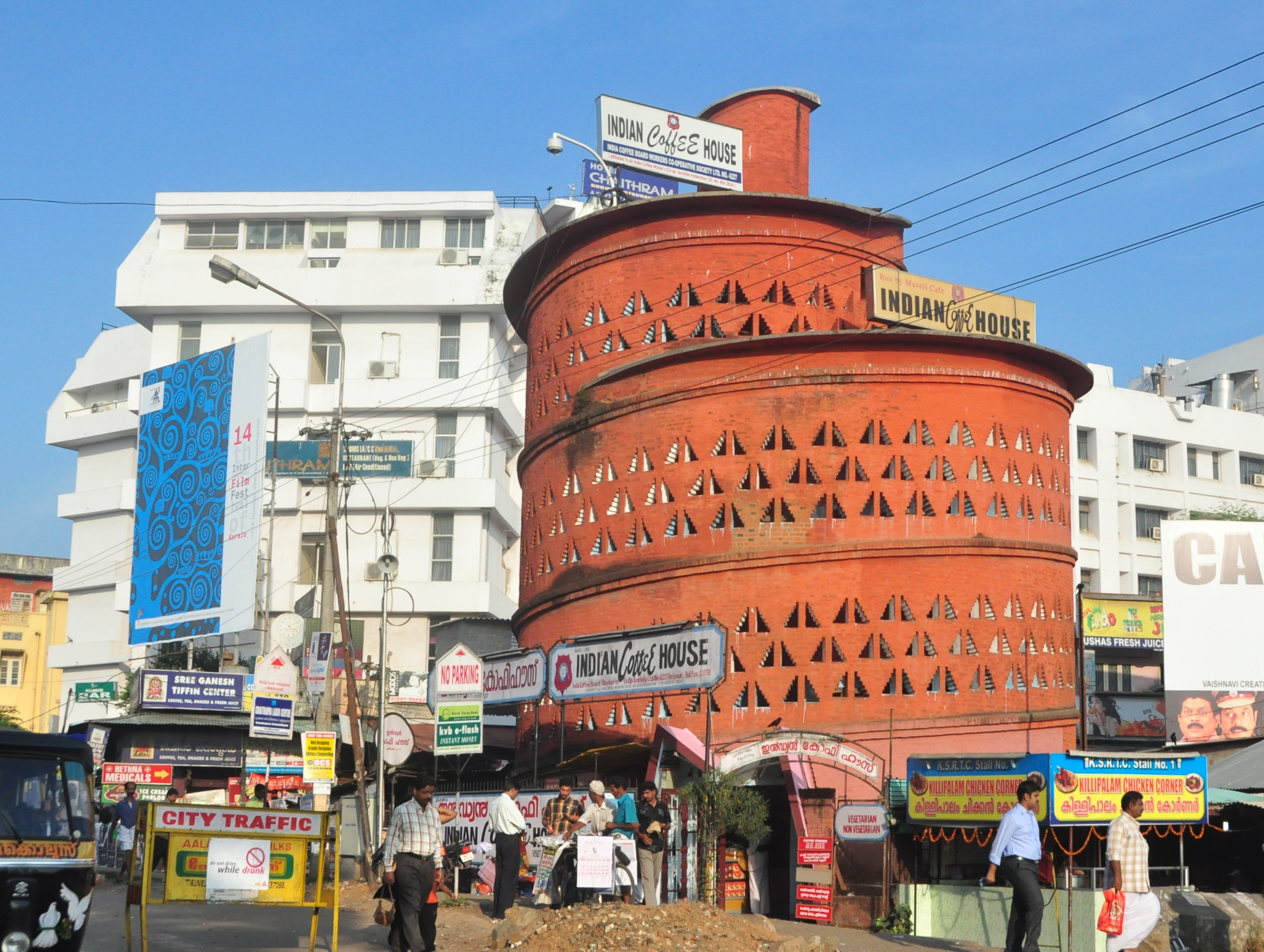 ലാറി ബേക്കർ രൂപ കല്പന ചെയ്ത ഇന്ത്യൻ കോഫീ ഹൌസ്, തിരുവനന്തപുരം